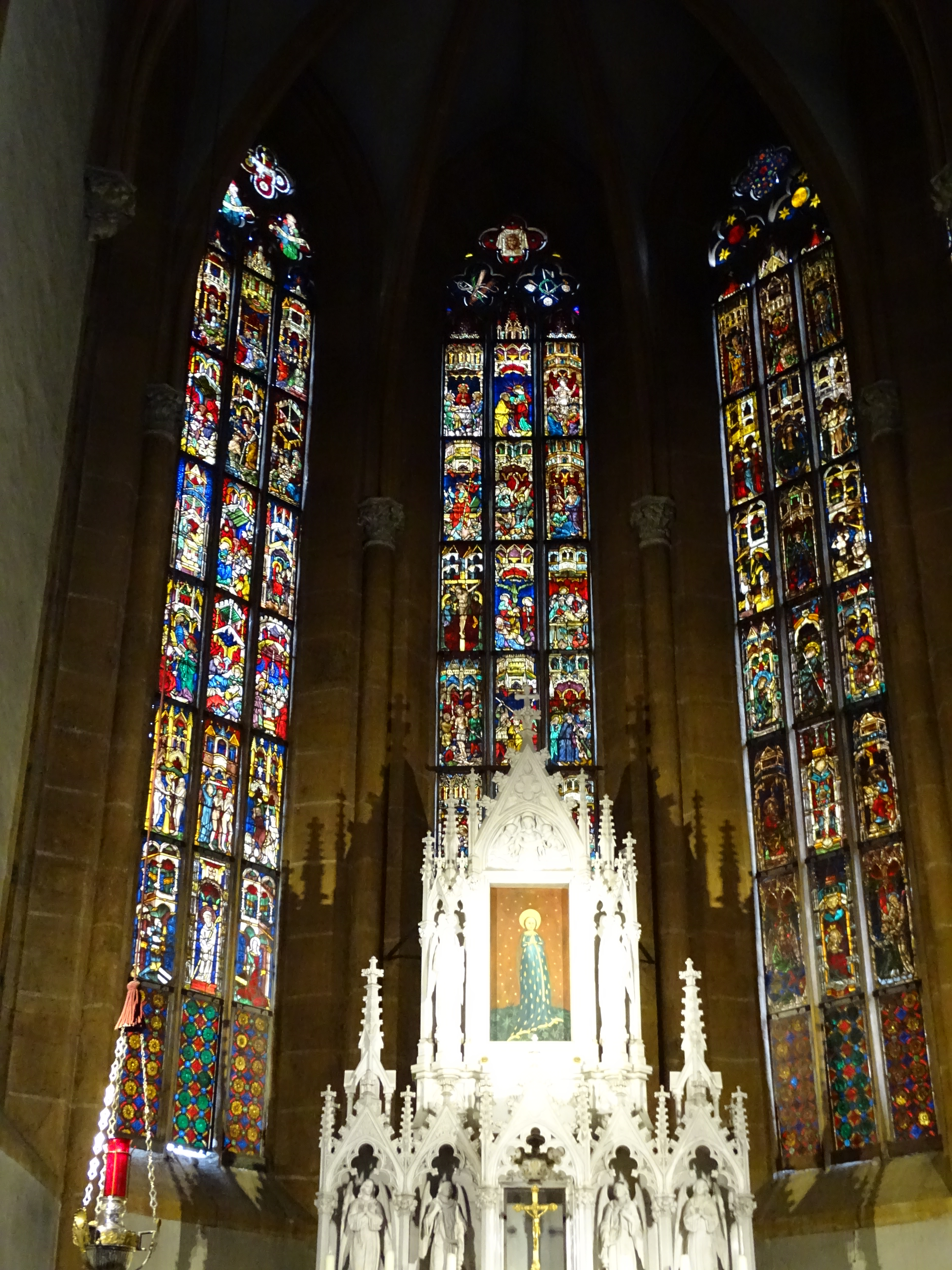 Die Chorfenster der Wallfahrtskirche Maria Straßengel mit dem Hochaltar im Vordergrund